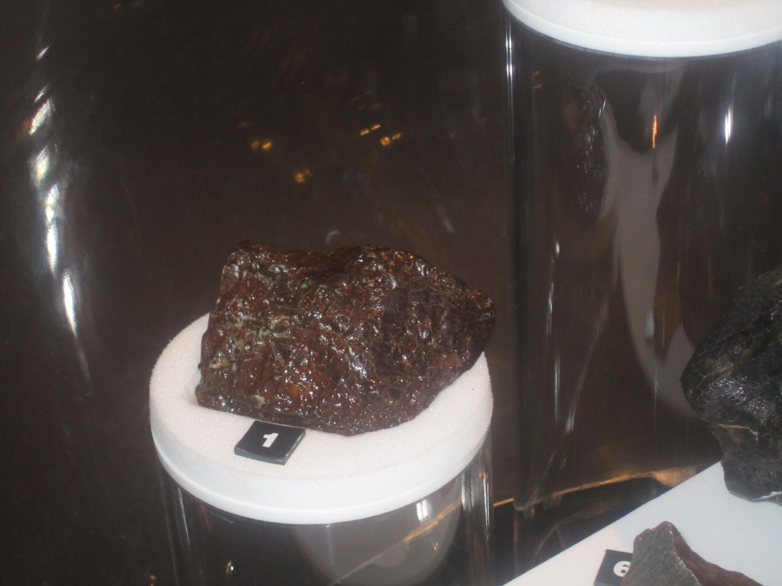 ऑस्ट्रेलियात सापडलेली उल्का